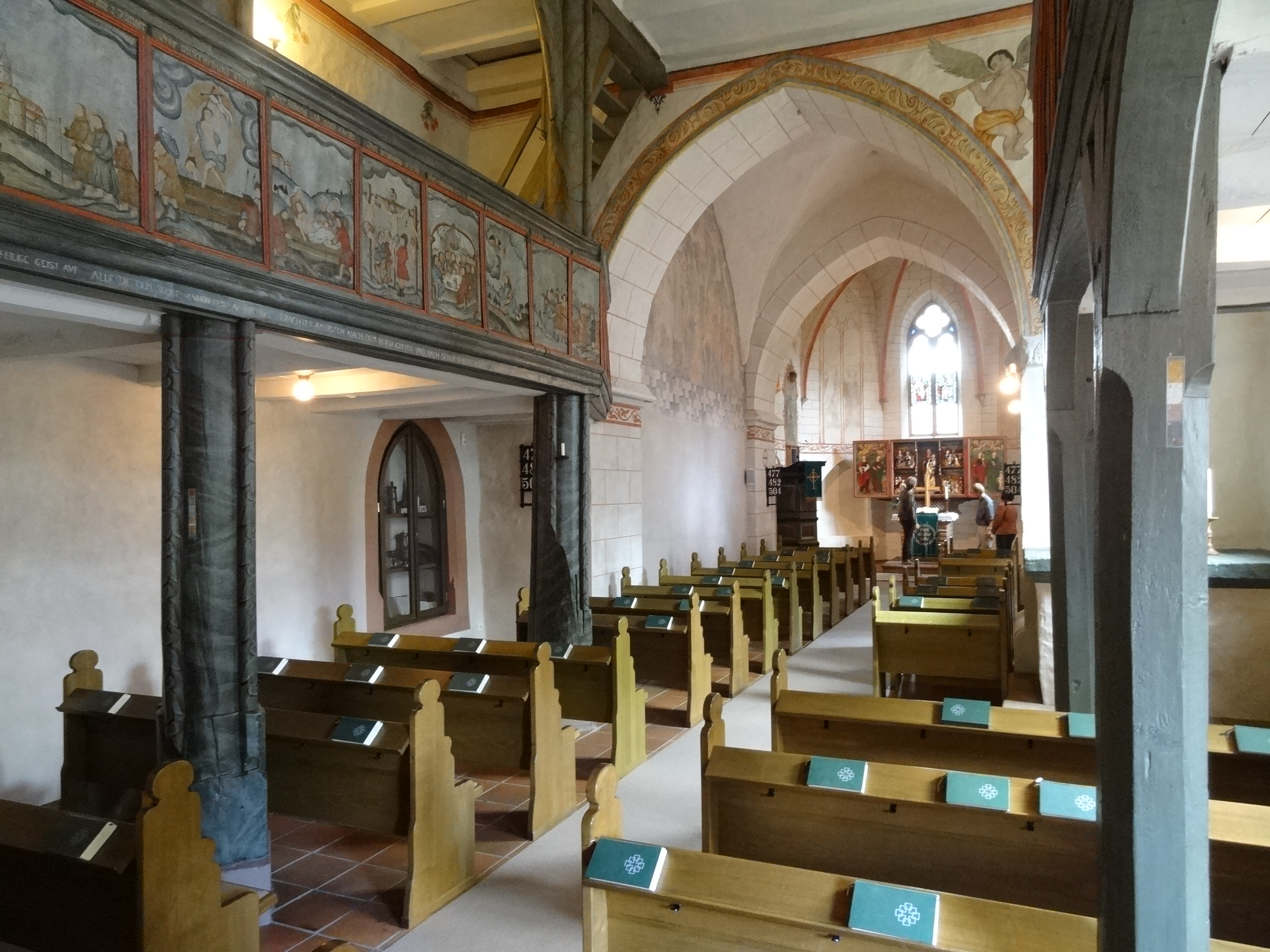 Evangelische Kirche (Heuchelheim, Hessen)